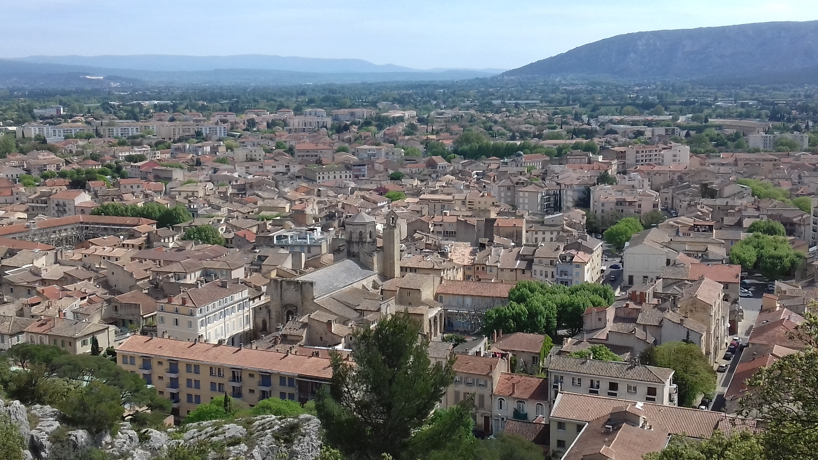 Panorama de la vieille ville de Cavaillon, photo prise depuis le sommet de la colline Saint-Jacques.